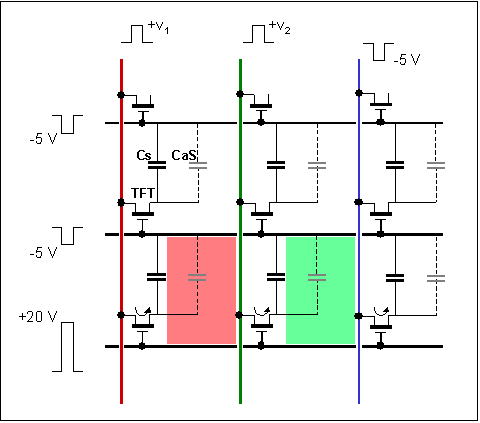 Schéma électrique équivalent des cellules TFT d'un écran à cristaux liquides (TFT-LCD) où la pixel inférieur est allumé en jaune / Equivalent electric schematic of a TFT array in a LCD display. A yellow pixel is lit by polarising R and B sub-pixels of the bottom pixel. Les lignes horizontales commandes les grilles des transistors à effet de champ; les lignes verticales pilotent les sources. / Horizontal lines drive the gates of the field-effect transistors (FET) while vertical ones command gray level through the sources. Cs: Capacité de stockage du sous-pixel / subpixel storage capacitance Cgs: Capacité parasite entre l'électrode du sous-pixel et l'électrode avant / parasitic capacitance between cell electrode and front electrode Comments are welcome Image talk:Color TFT-LCD Cells-Schematic.png Commentaires bienvenus